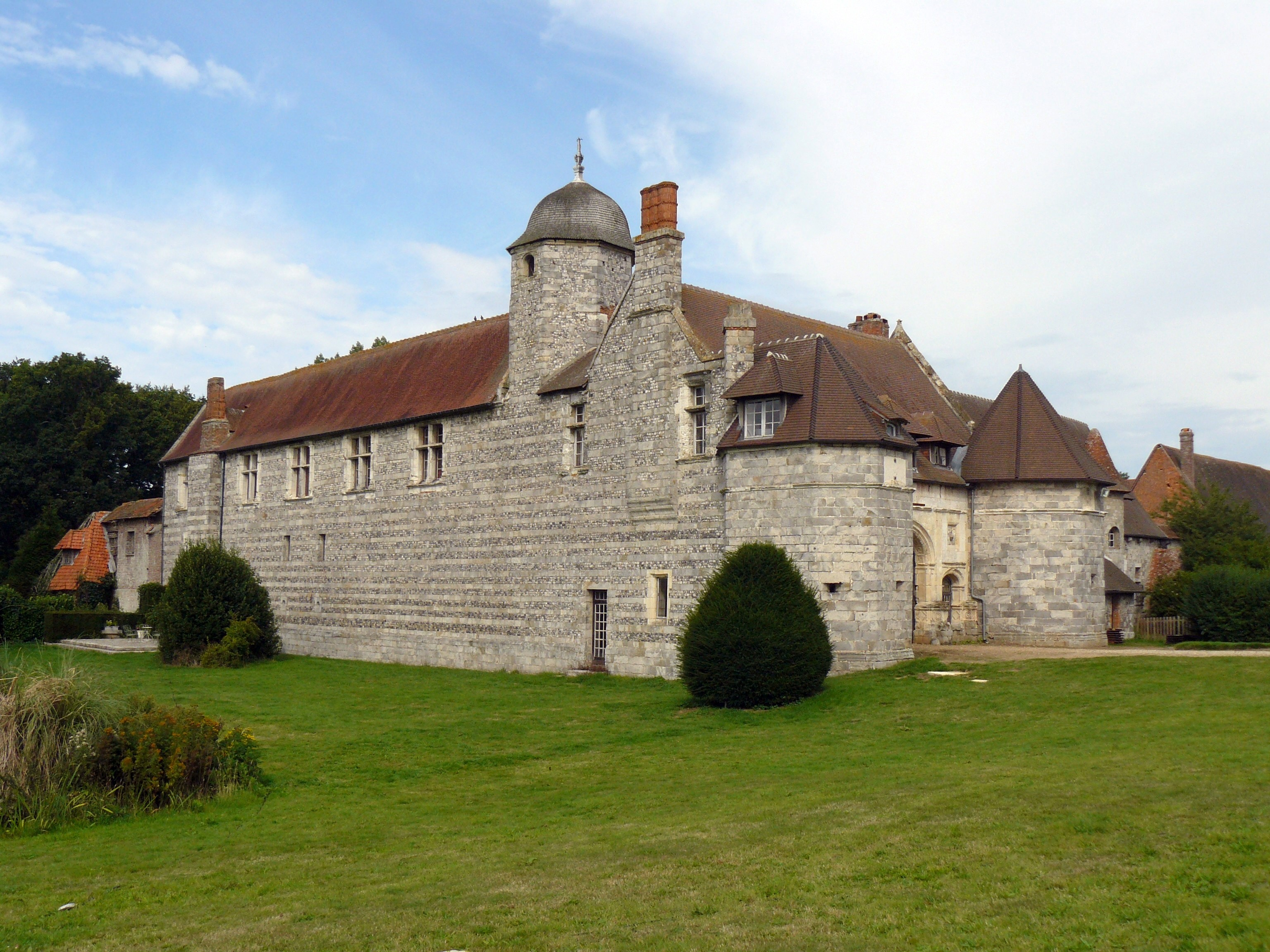 Manoir d'Ango (Varengeville-sur-Mer, Seine-Maritime, France) : vue d'ensemble extérieure